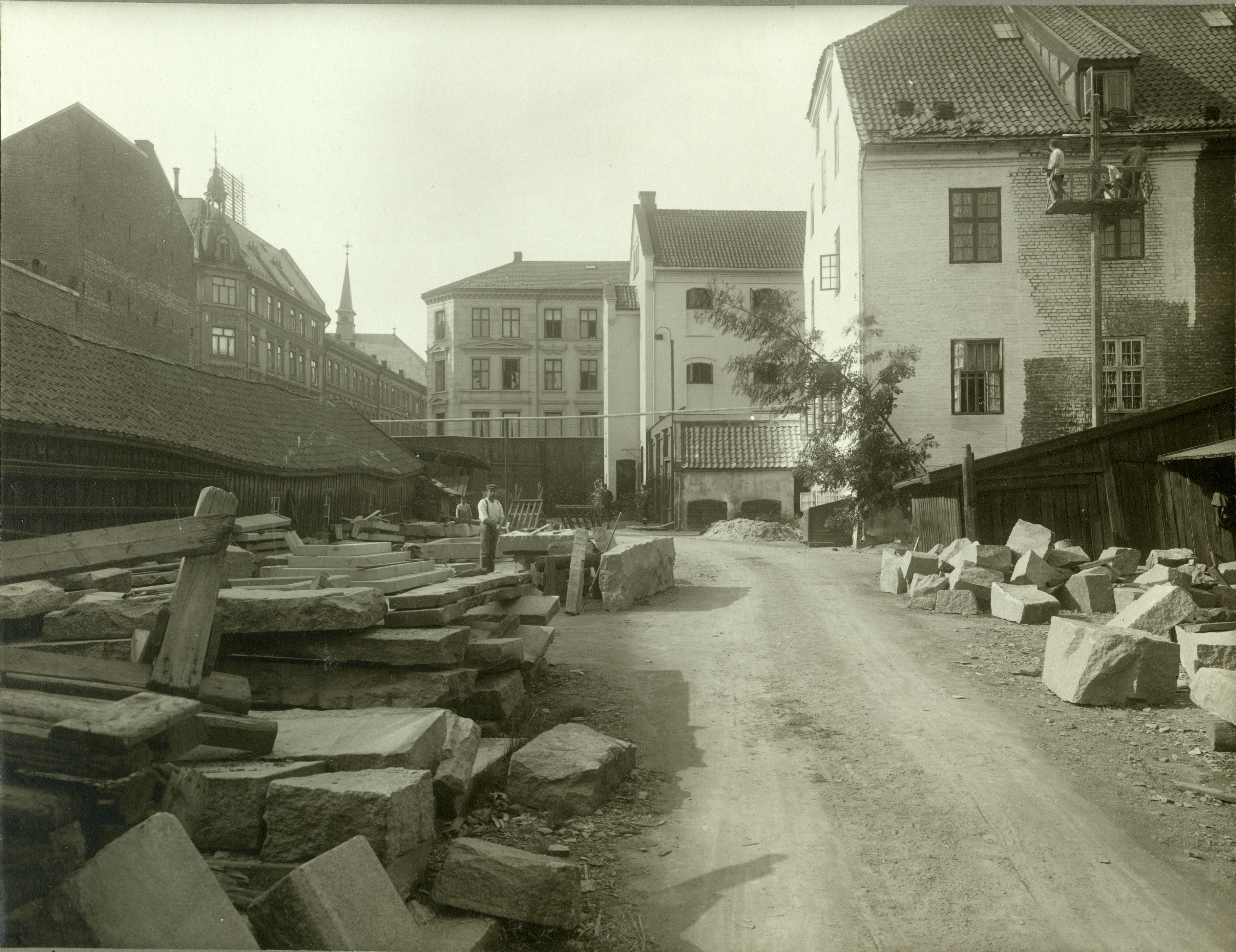 Bildet er hentet fra Arkivverket. Fra stenhuggeriet. Længst til høire sees fabrikbygningen og bakenfor der den bygning hvor de store sovelokaler findes. I bakgrunden gaarde i Storgaten m.v. August maaned 1914. Fra 1819 til 1915 var det tvangsarbeidsanstalt i Storgata 36. Det var Stiftelsen Prins Christian Augusts Minde som i 1812 kjøpte herskapsvillaen Mangelsgården i Storgata 36 og etablerte tvangsarbeidsanstalt der. Arbeidet i anstalten besto av tekstilarbeid som spinning og veving, drevplukking som var opptrevling av gammelt tauverk, en rekke ulike verksteder med skomaker-, seilmaker- og smedverksted. Utearbeid var steinpukking eller veiarbeid. Tvangsarbeidsanstalten ble nedlagt i 1915 og tvangsarbeiderne ble overført med forstander Arne Omsted til Opstad tvangsarbeidshus på Jæren. Arkivinstitusjon : Riksarkivet Arkivnavn : Justisdepartementet, Fengselsstyret D del 2 Sted : NORGE, Oslo, Oslo, Emneord: Fengselsvesen, Fengsel, Tvangsarbeid, Straff, Fredede bygg Avbildet